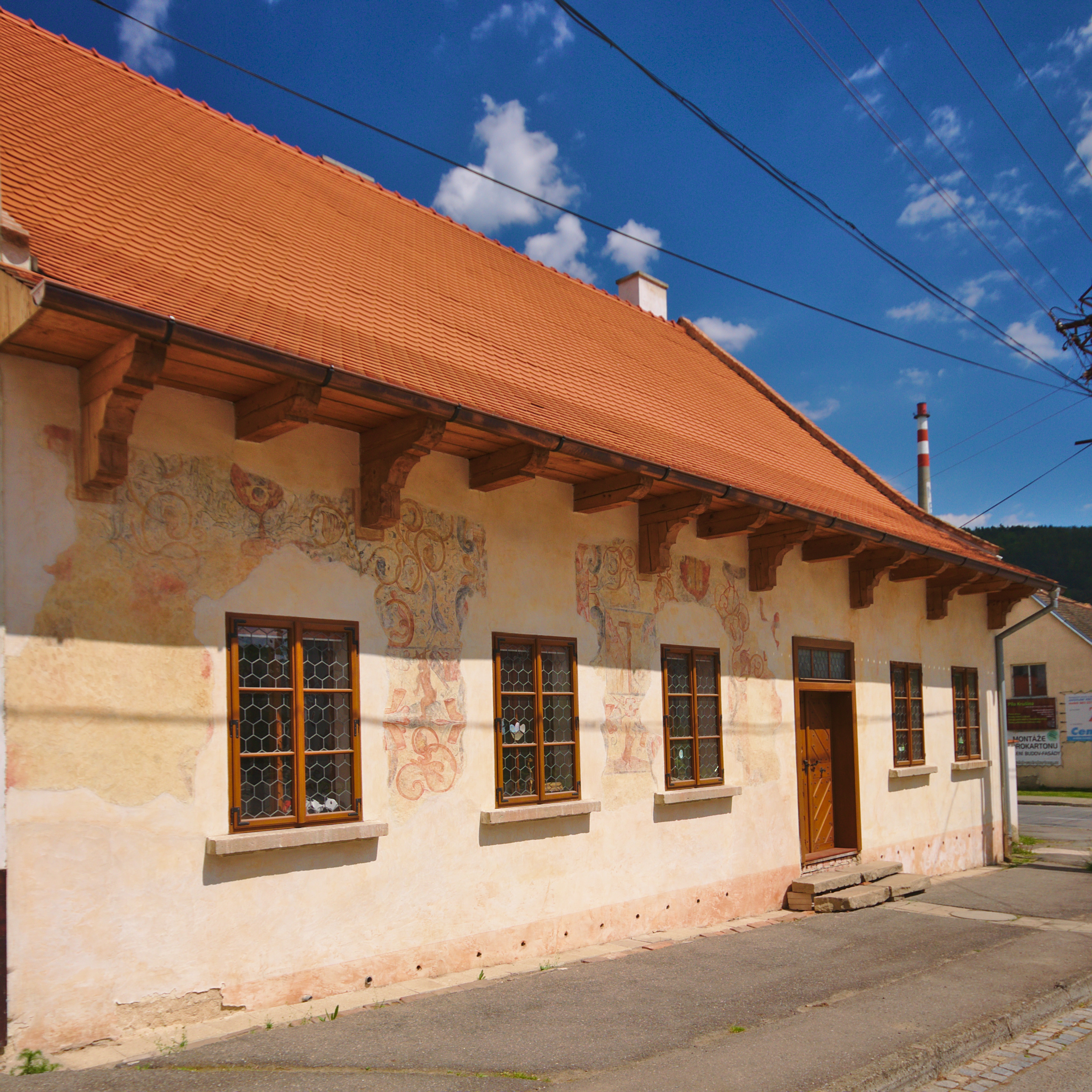 Dům čp. 35, Nedvědice, okres Brno-venkov